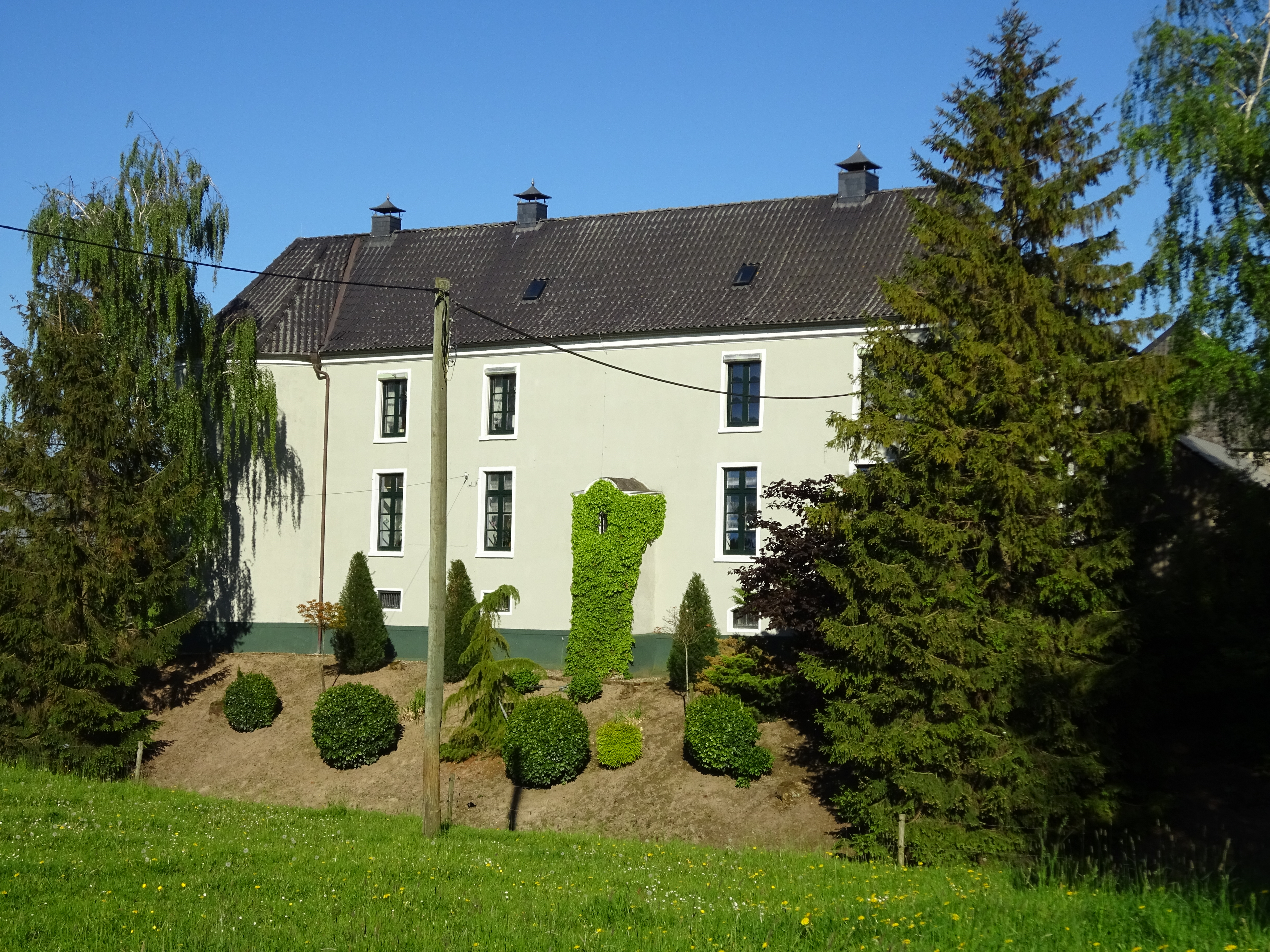 Haus Hönnepel, Griether Straße 48, Kalkar-Hönnepel